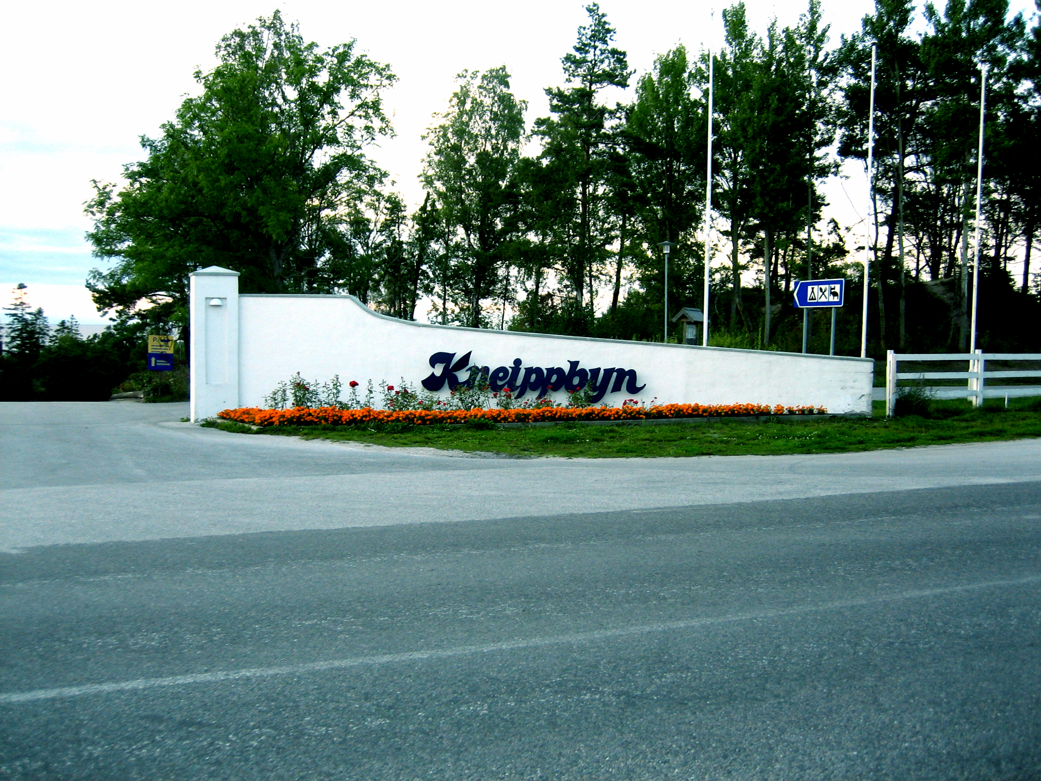 Kneippbyn, Gotlands största turistanläggning, finns i Vibble